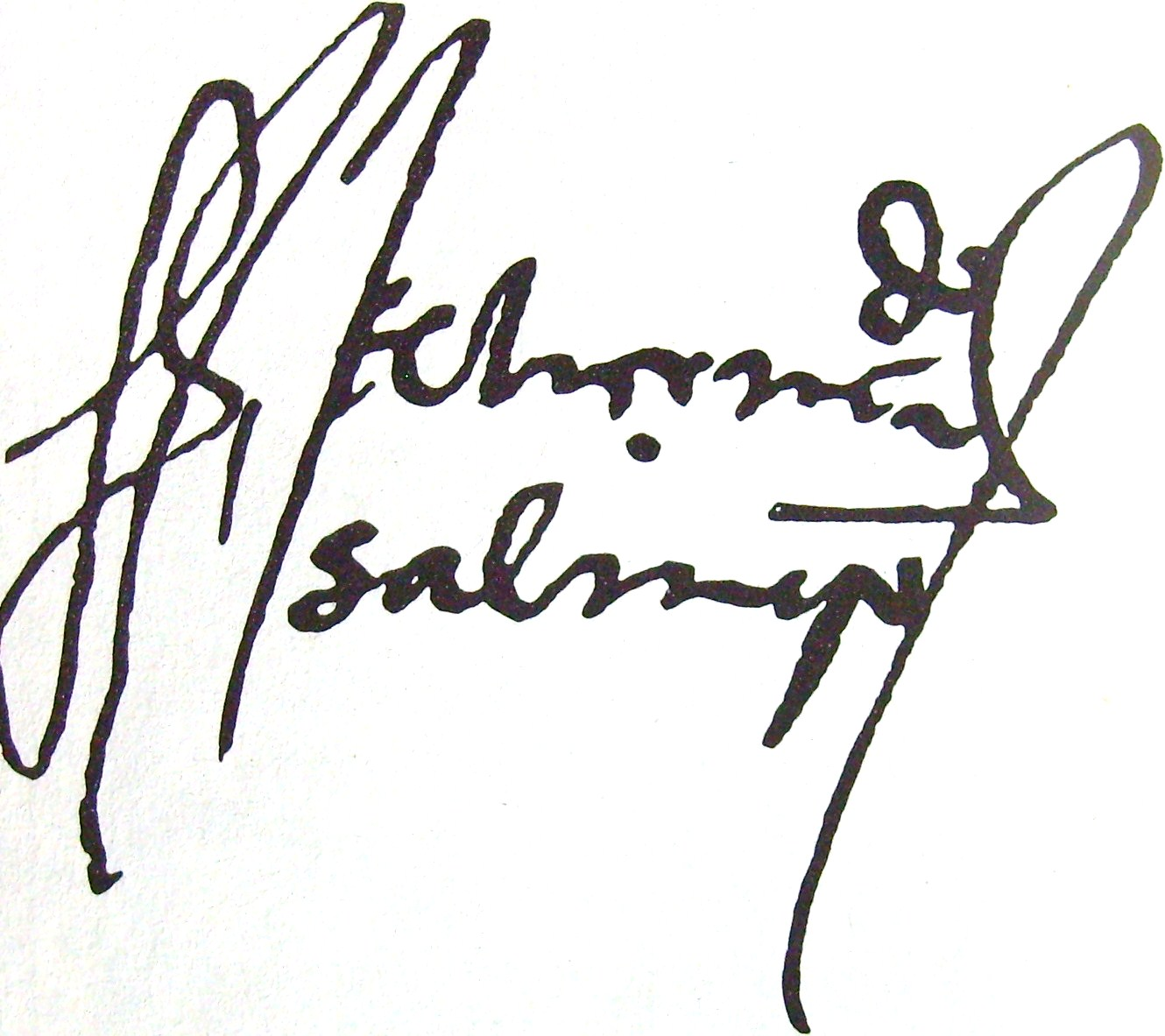 Rúbrica del licenciado Juan de Salmerón, fundador de la ciudad de Puebla